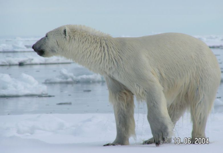 Svalbard (Spitsbergen)